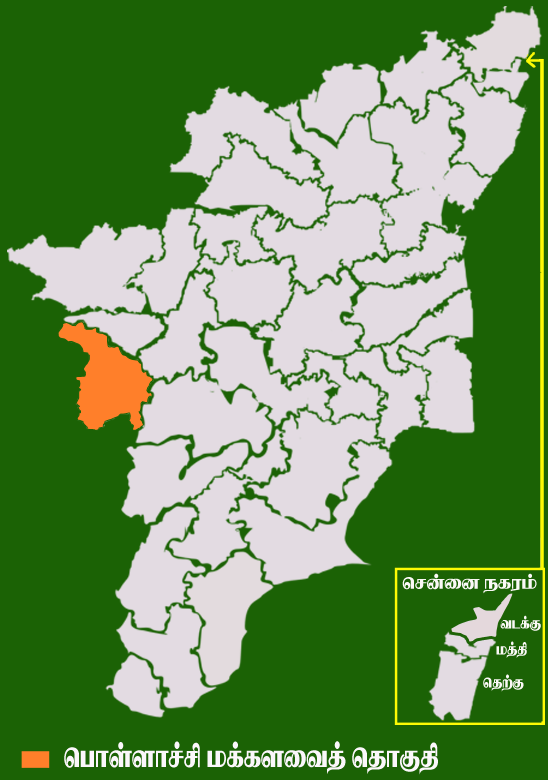 தமிழக வரைபடத்தில் உள்ள பொள்ளாச்சி மக்களவைத் தொகுதி